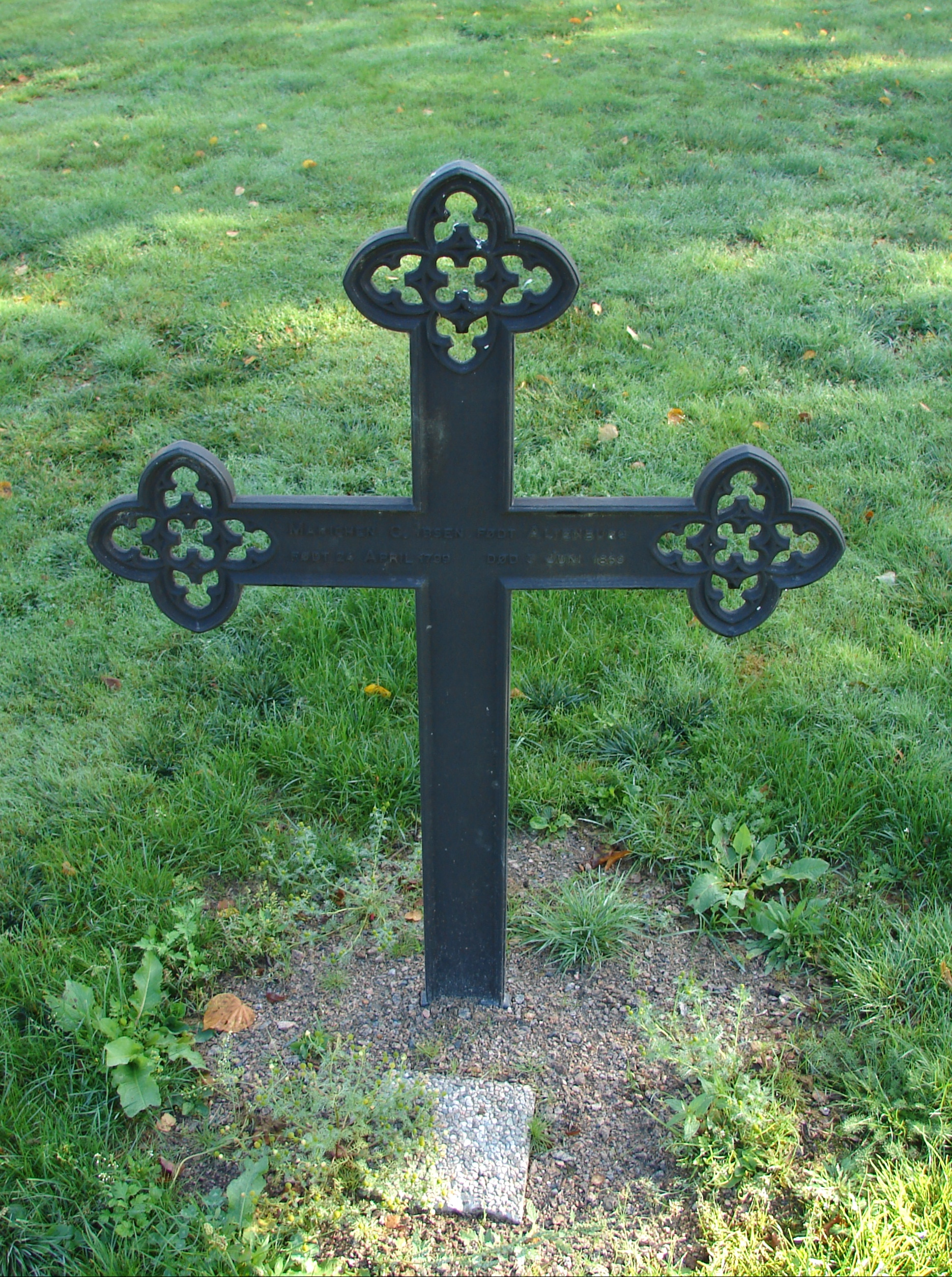 Marichen C. Ibsen født Altenburg, født 24 April 1799 død 3 Juni 1869, gravminde fra Lie kirkegård, Skien